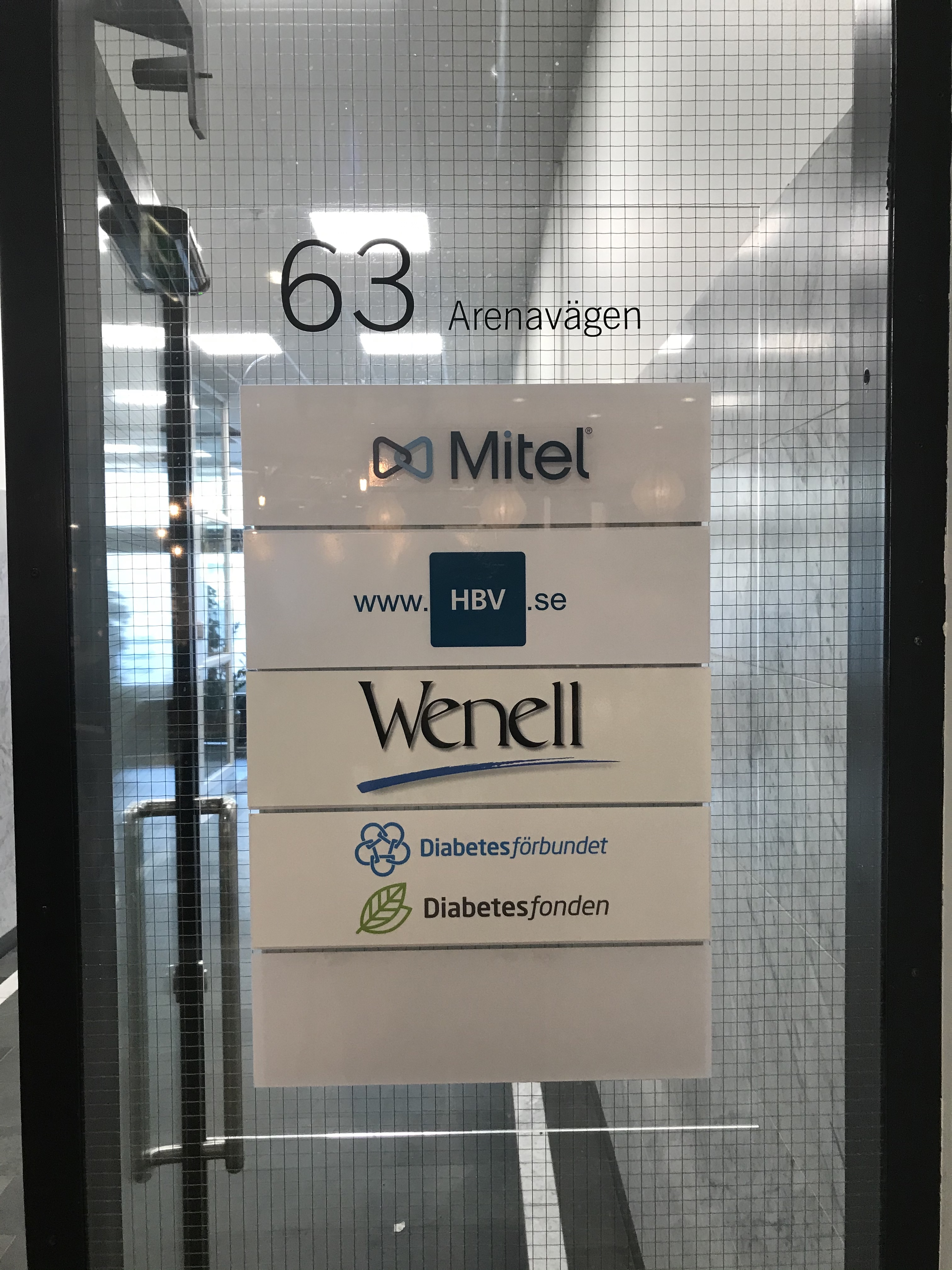 Entren till HBV i Globen shopping